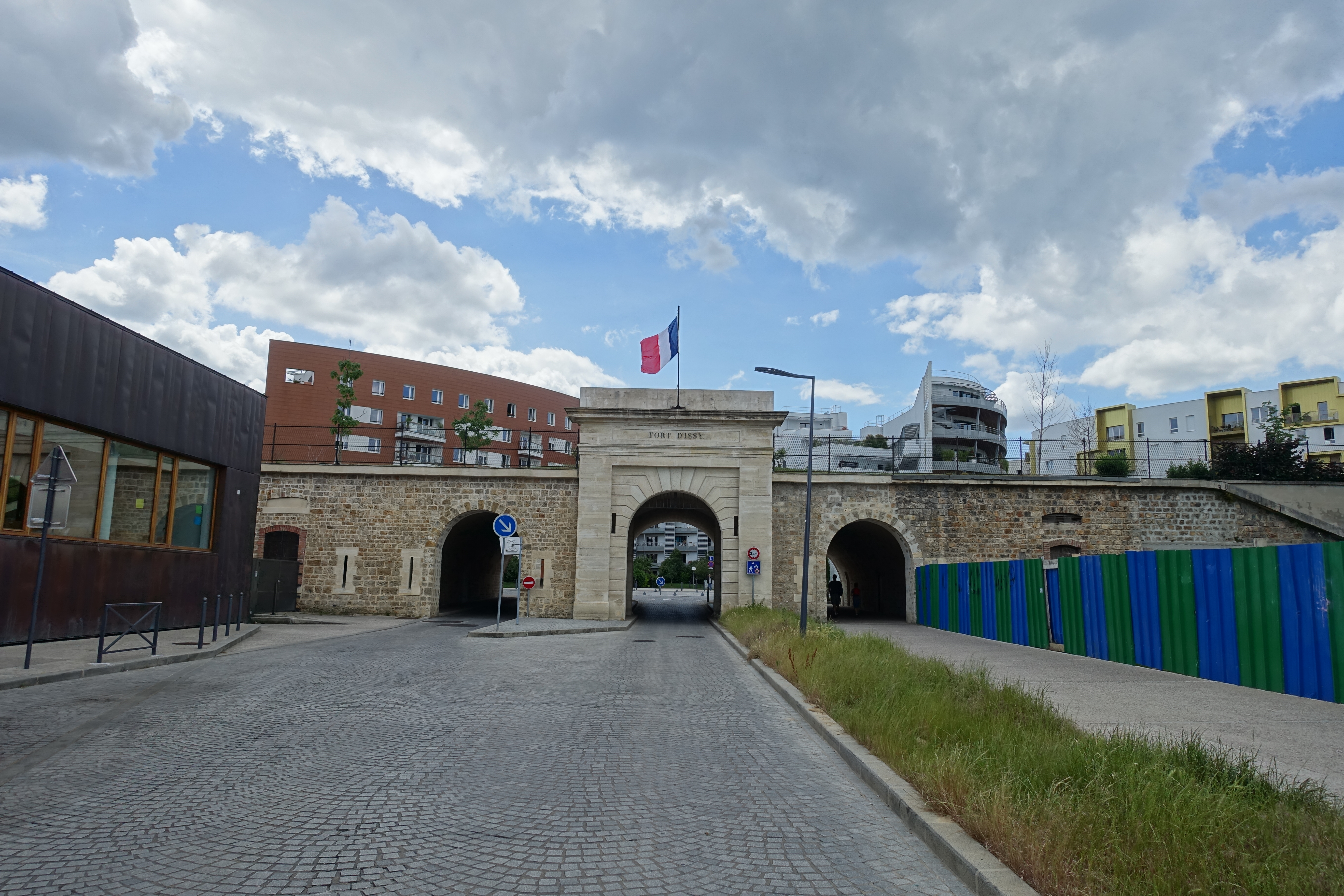 Entrance @ Fort d'Issy-les-Moulineaux